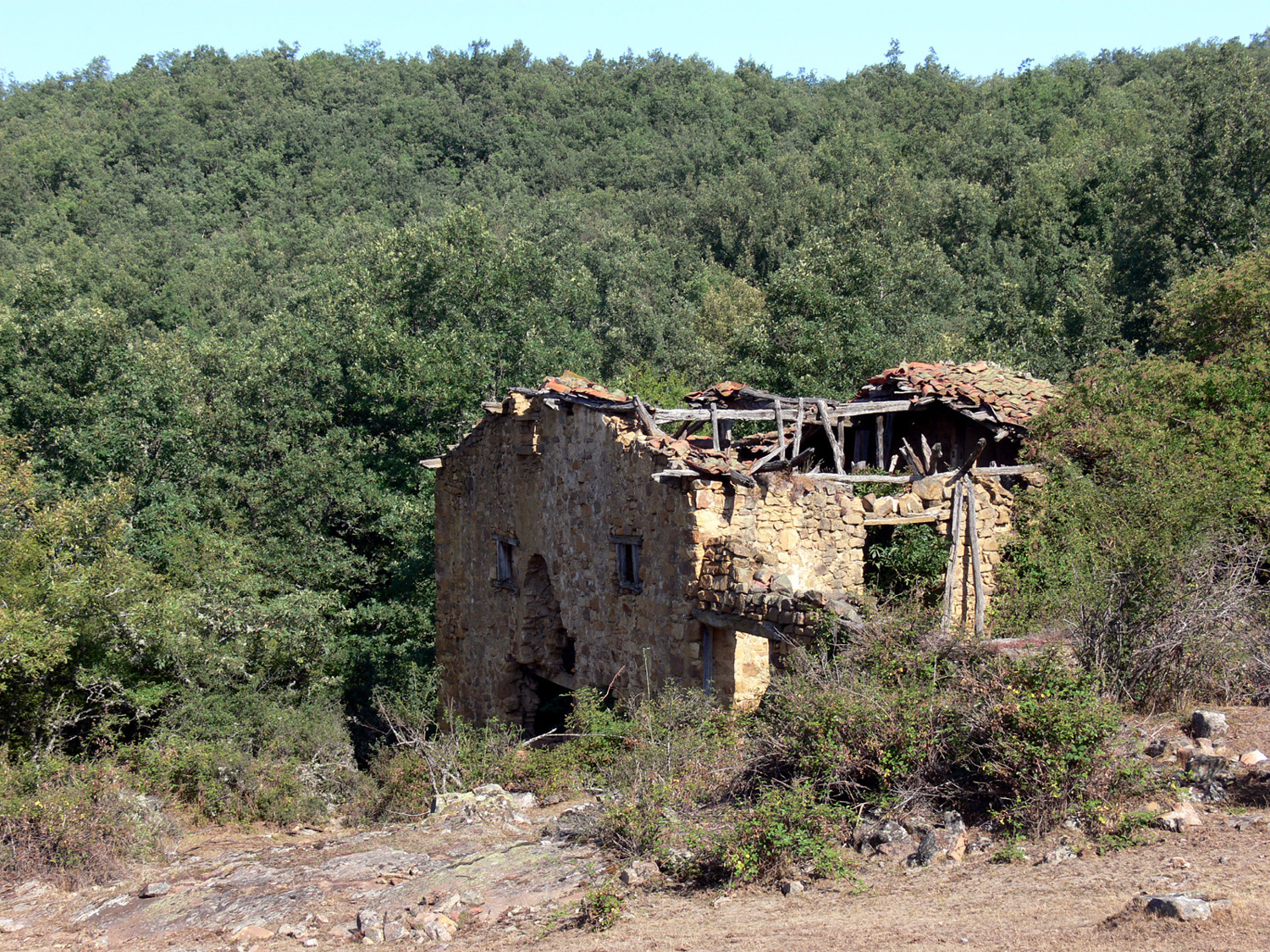 El Hoyo, despoblado de Lumbreras, La Rioja - España.